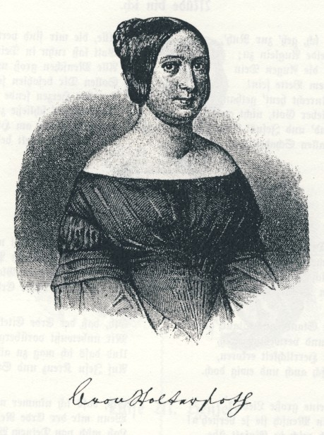 Portrait der deutschen Schriftstellerin Adelheid von Stolterfoth.